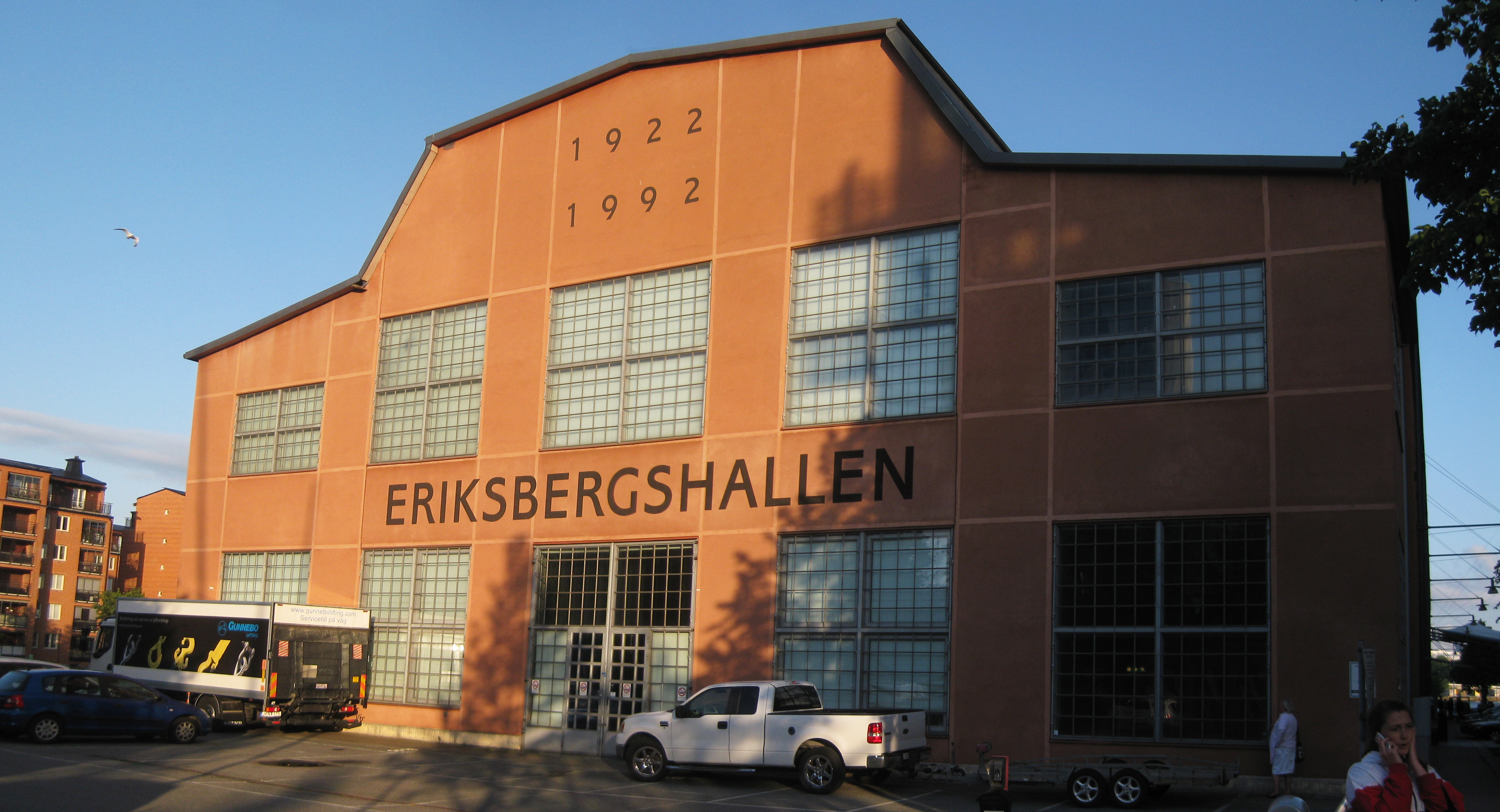 Baksidan av Eriksbergshallen, Göteborg